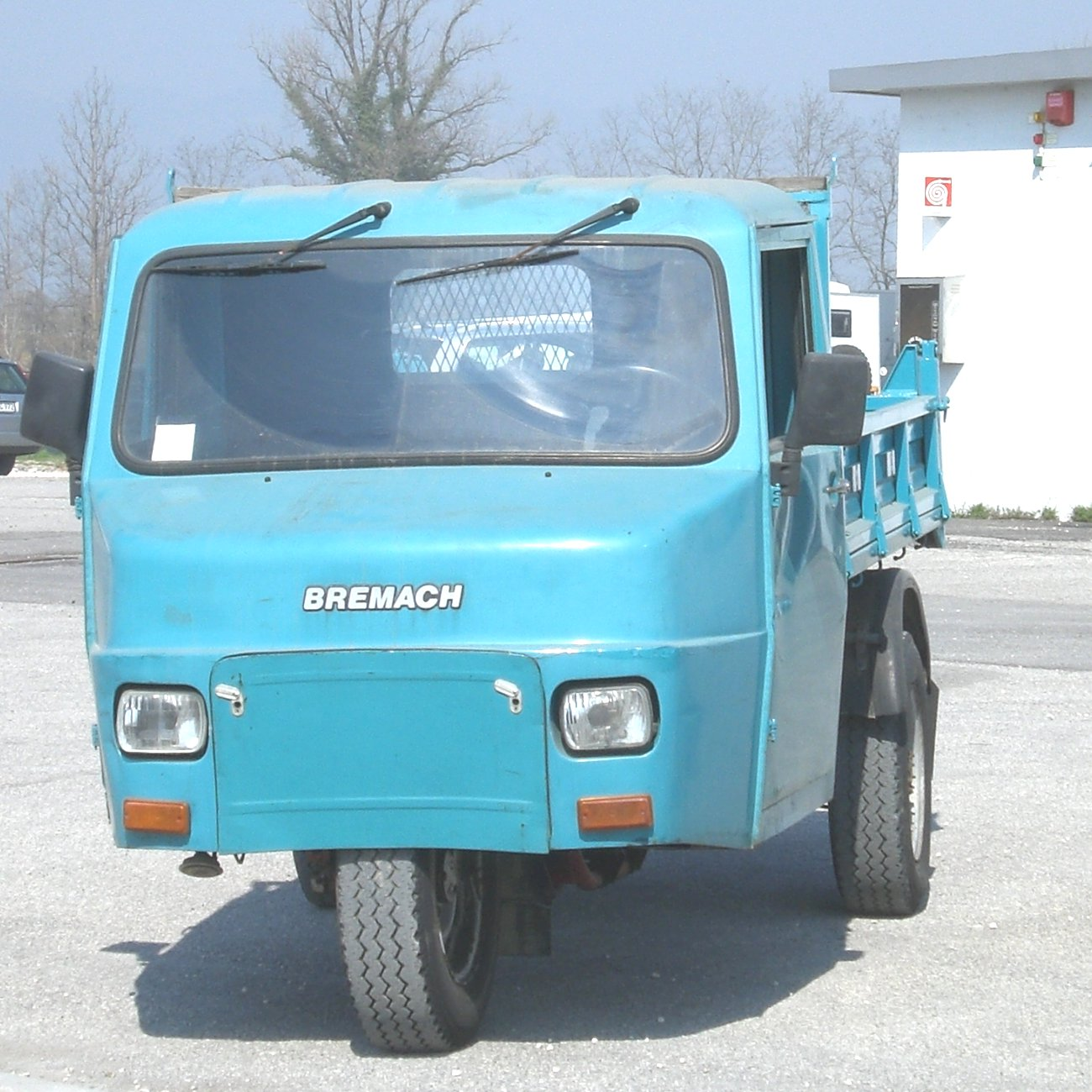 Motocarro Bremach ND3 a tre ruote degli anni '80